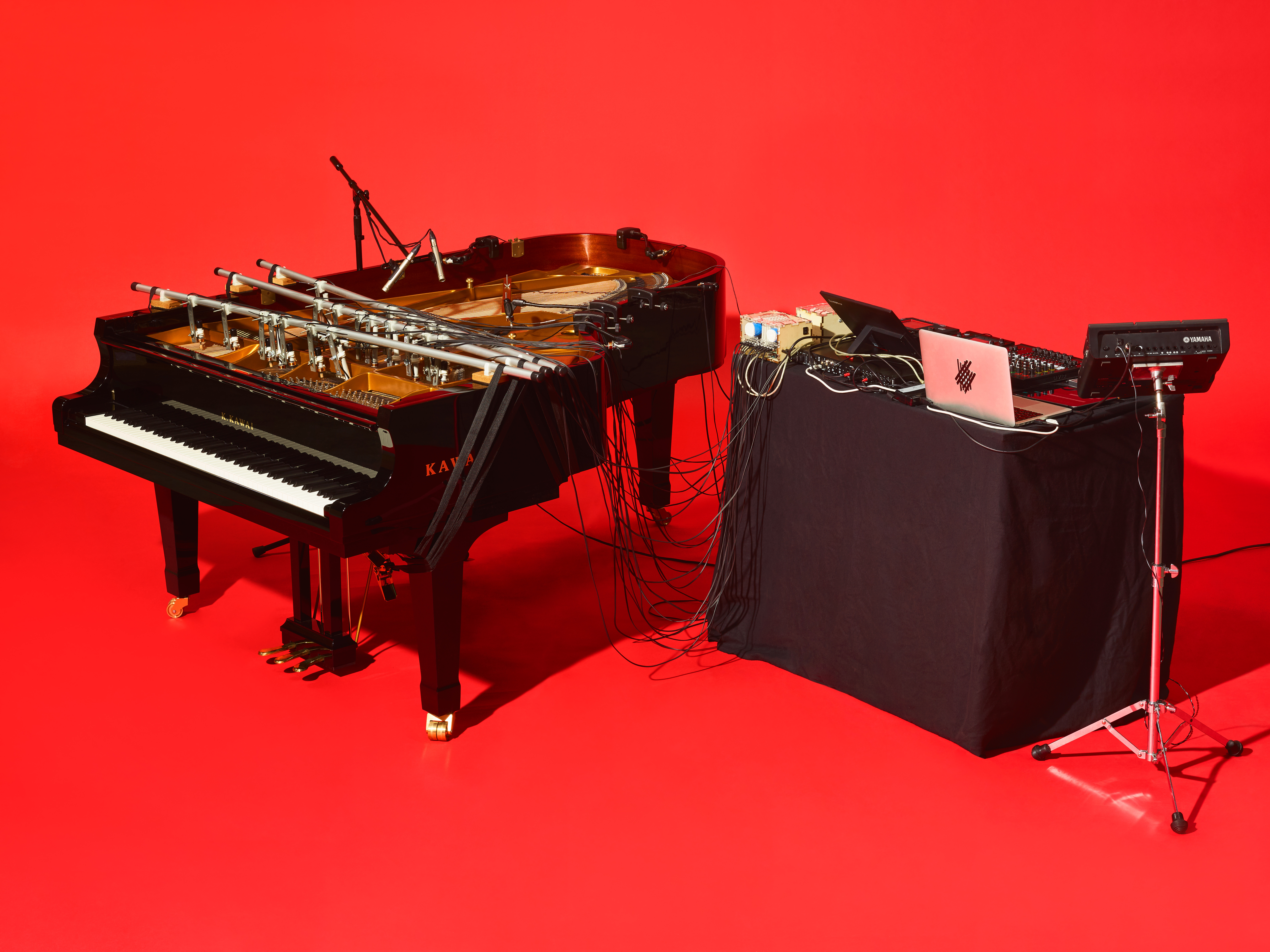 Technischer Aufbau von Grandbrothers - mit selbst entwickelter Apparatur auf dem Flügel